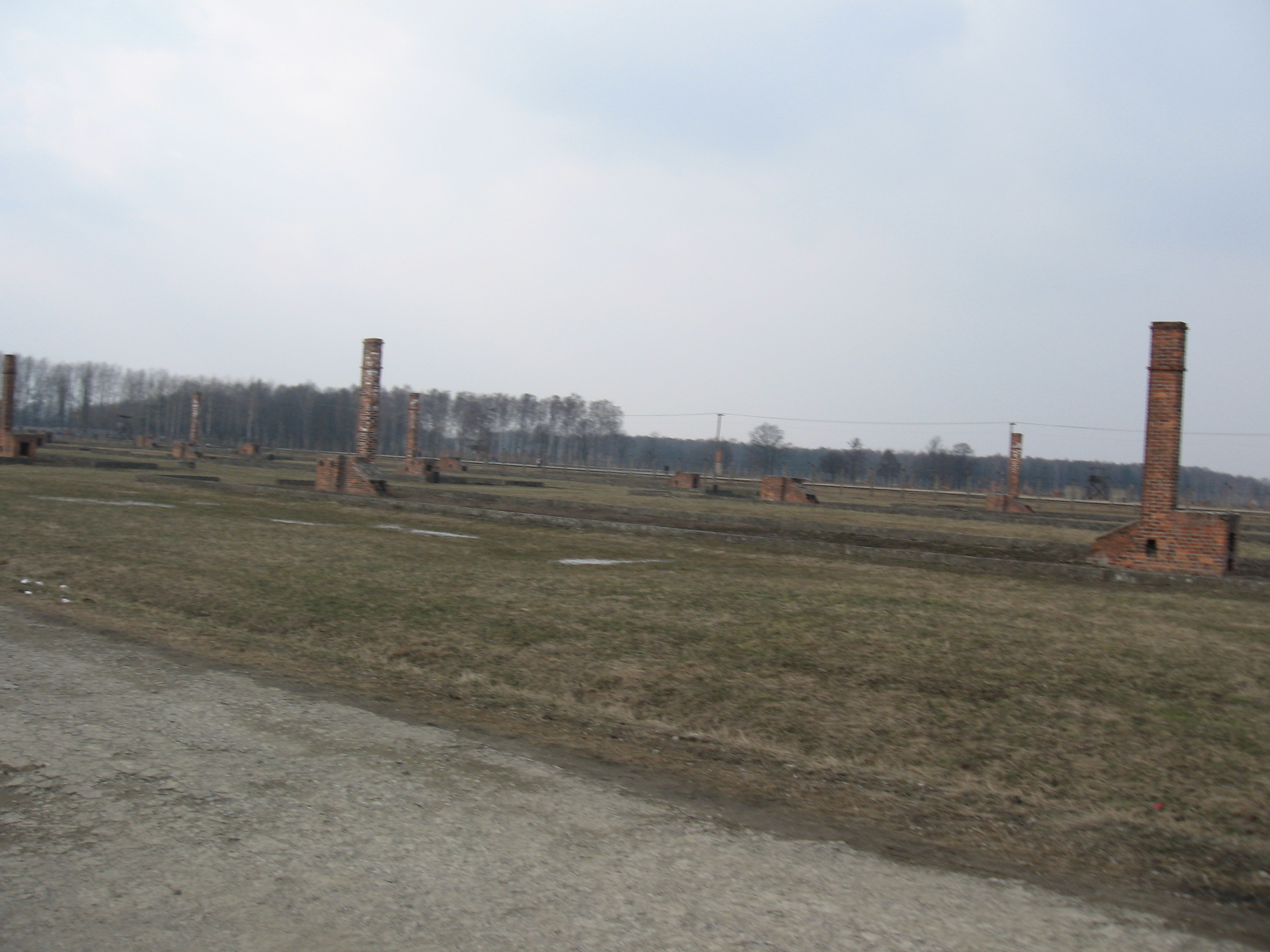 מה שנשאר היום ממגורי האסירים באושוויץ 2